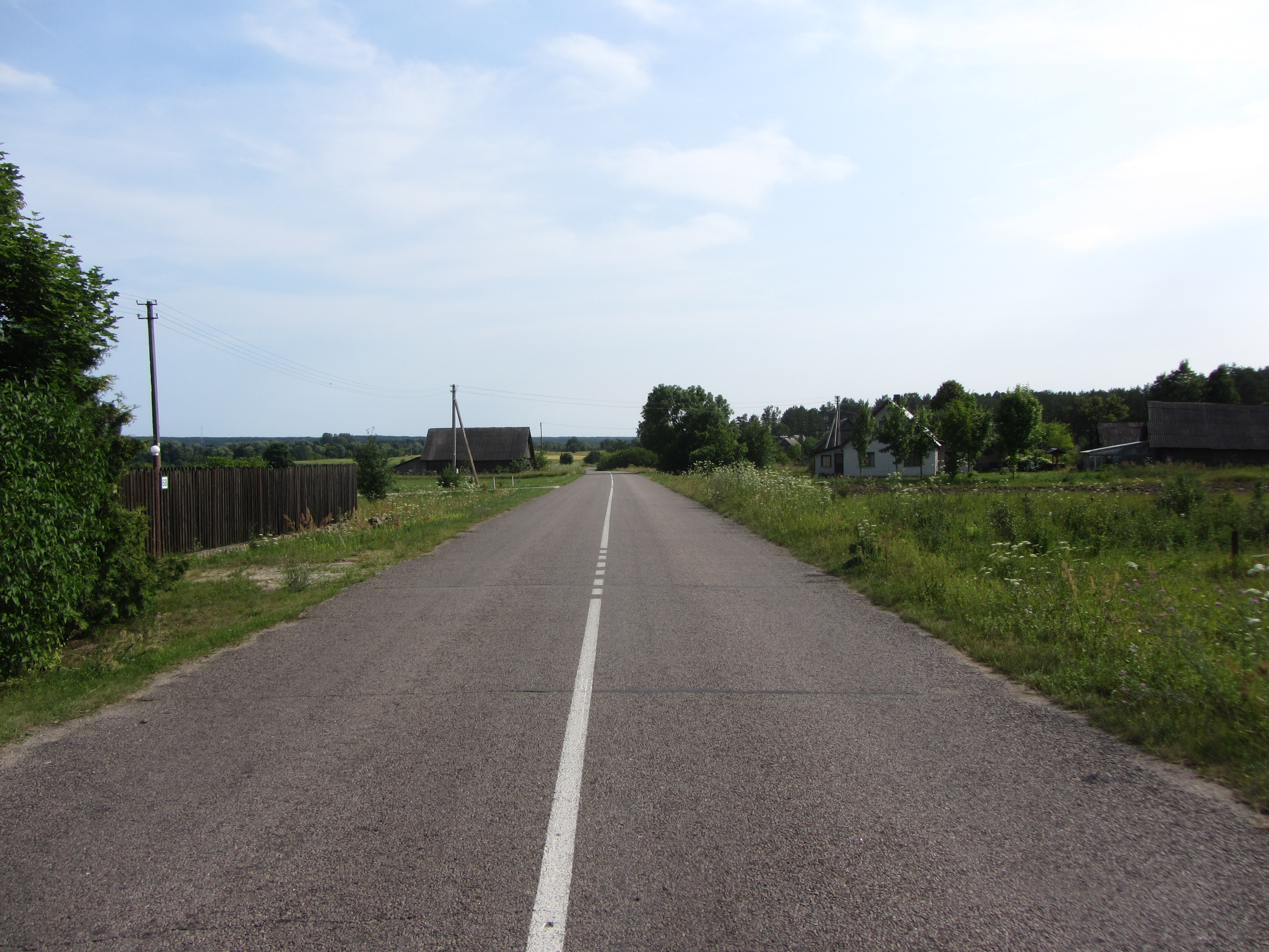 Lipliūnai, Lithuania